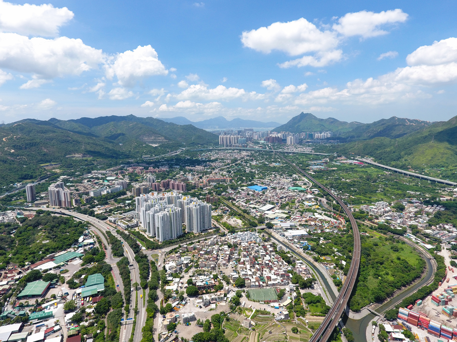 Hung Shui Kiu